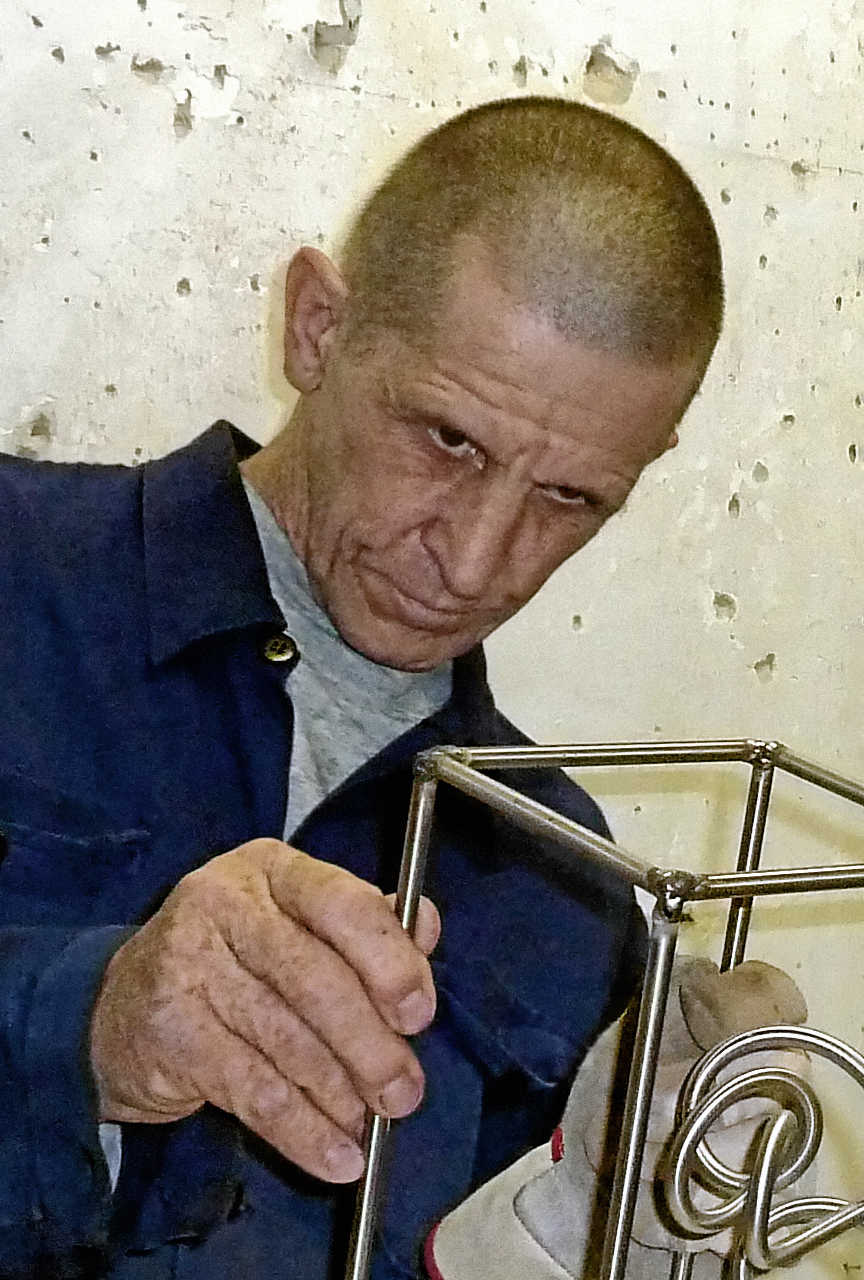 Gerhard Raab (* 1956); Portät (Selbstauslöser).